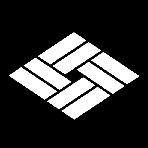 「西菱（人菱）」紋（染抜）